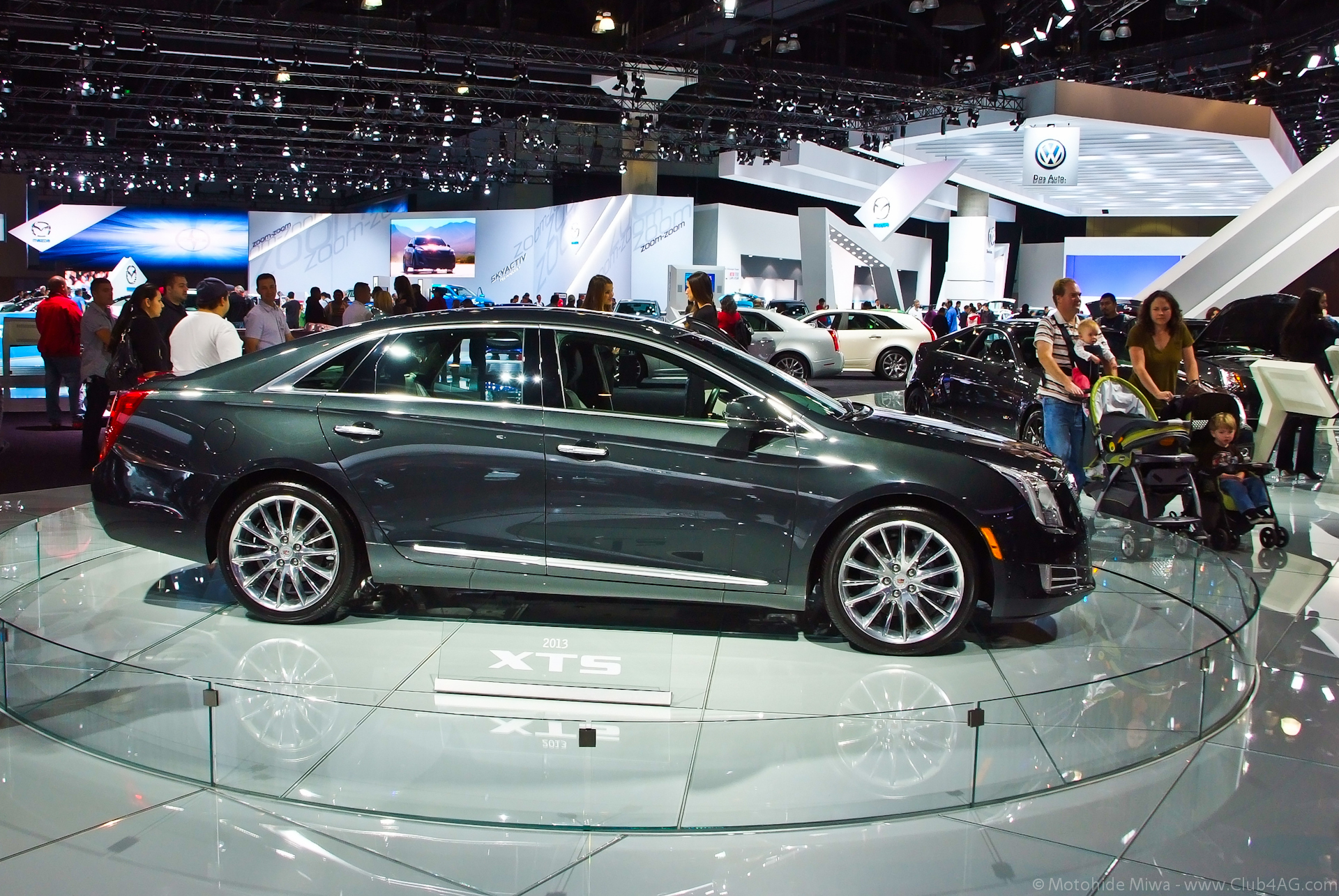 Cadillac XTS Full Size Sedan